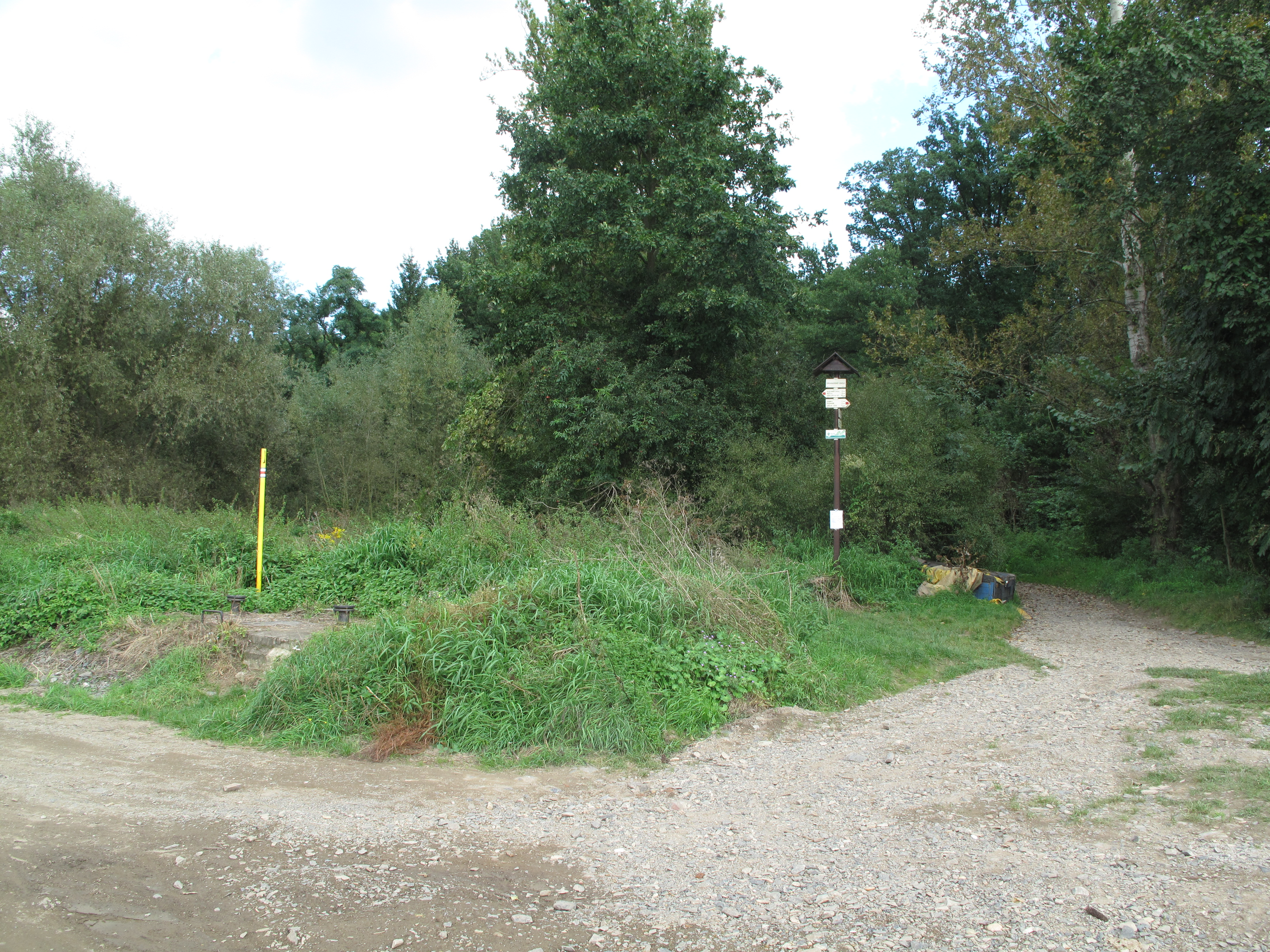 Drahanské údolí a Drahanský potok